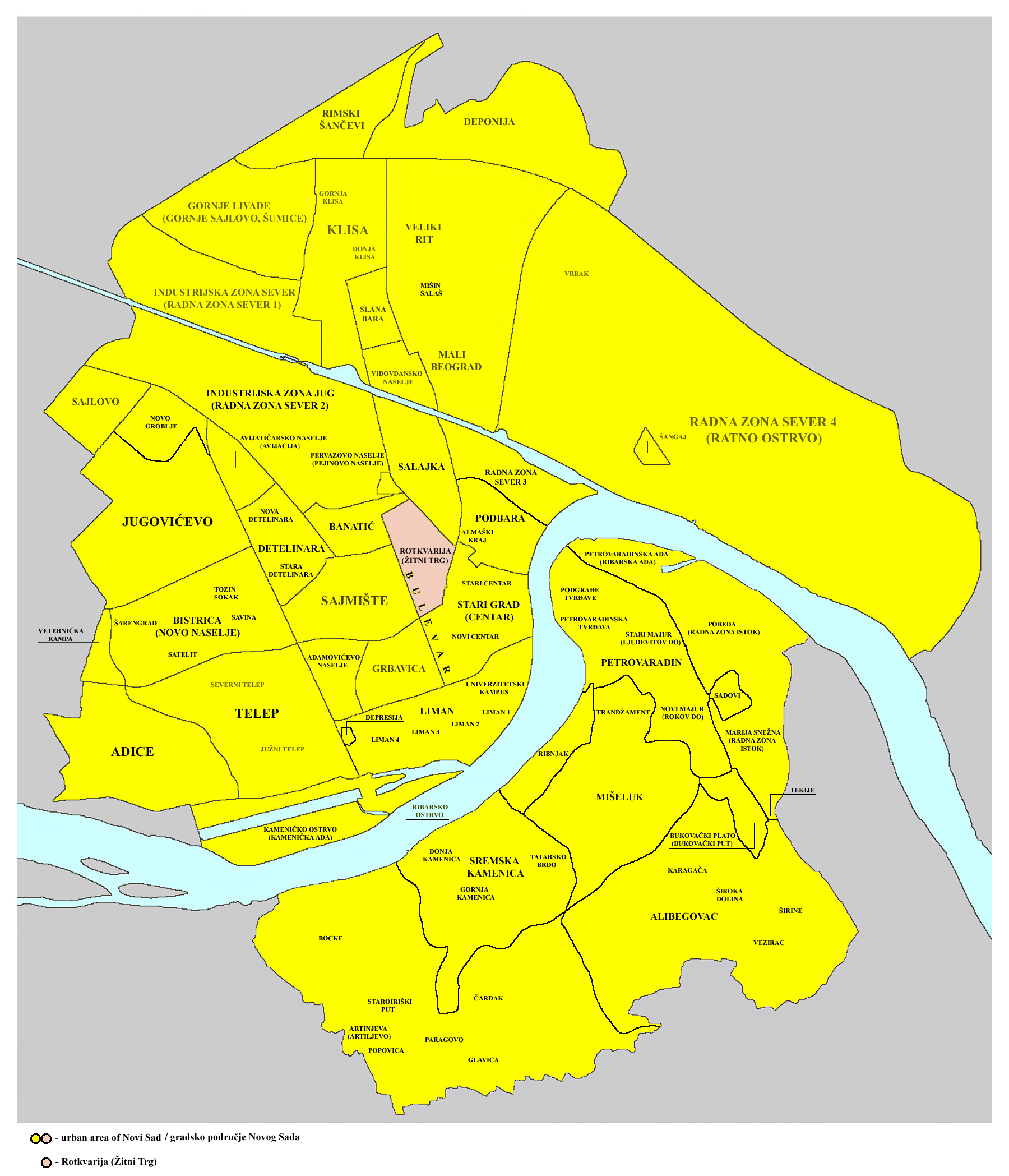 Location of map of Rotkvarija neighborhood of Novi Sad. Mapa položaja gradske četvrti Rotkvarija u Novom Sadu.